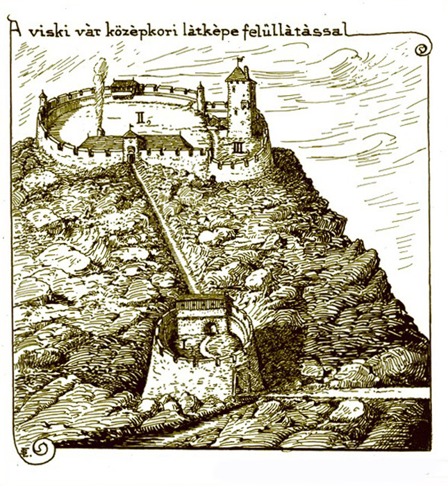 Вишківський замок (реконструкція Шооша Елемера)